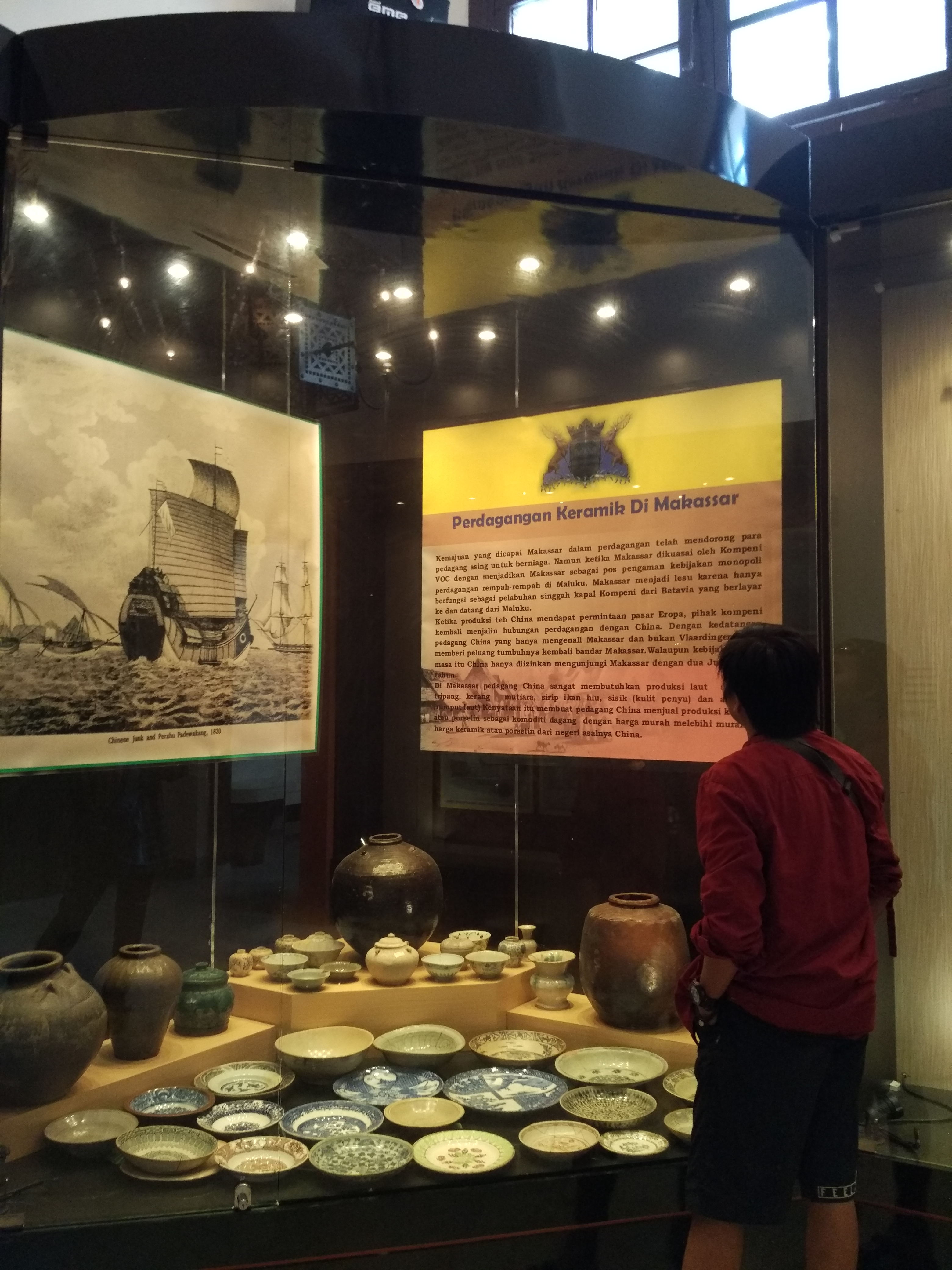 Alamat: Jl. Balaikota No.11, Baru, Kec. Makassar, Kota Makassar, Sulawesi Selatan 13470 Provinsi: Sulawesi Selatan